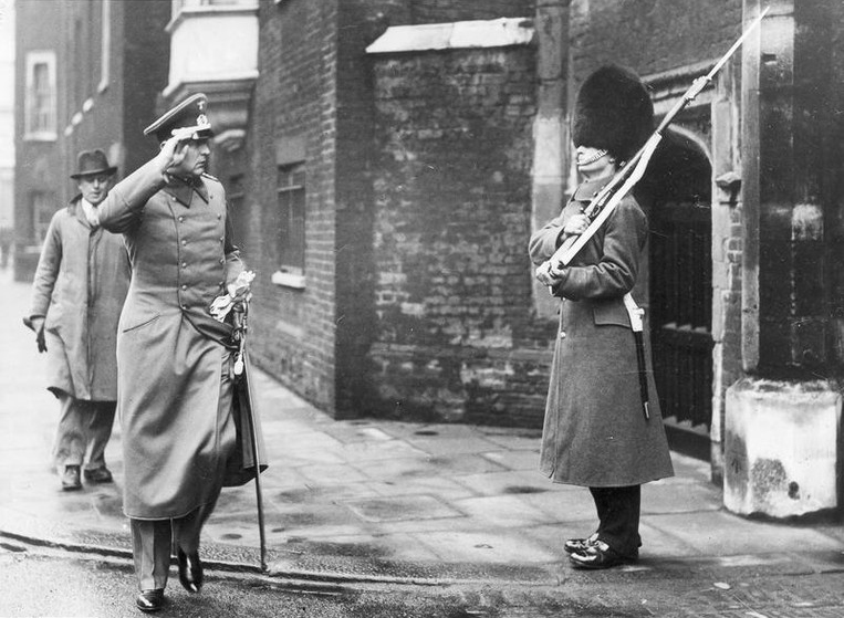 Generalmajor Leo Geyr von Schweppenburg. Von 1933 bis 1937 Militärattaché, seit dem 1. Juli 1935 auch Luftattaché, in Großbritannien, Belgien und den Niederlanden mit Sitz in London. Während dieser Zeit zum Generalmajor ernannt (1. September 1935).